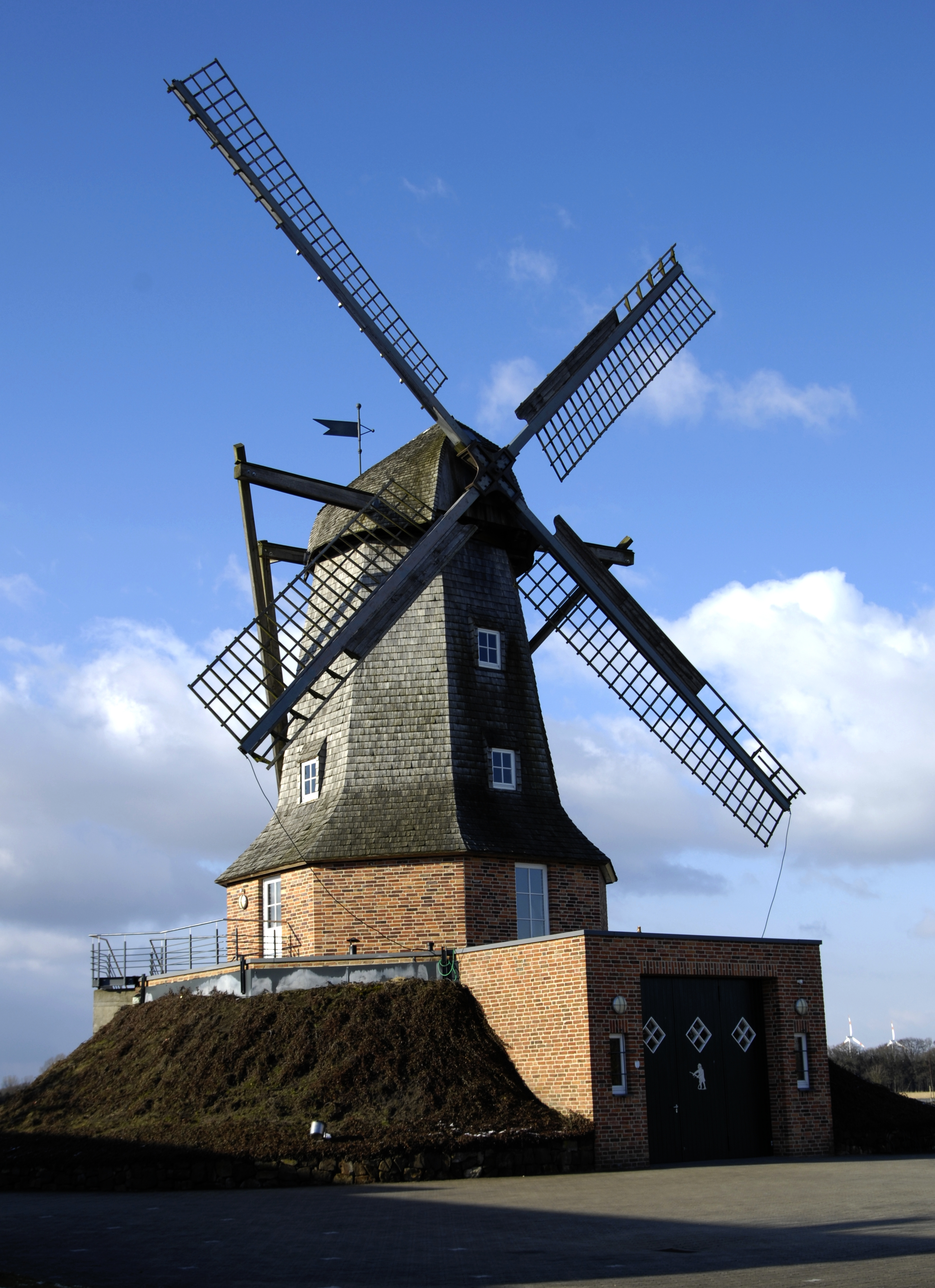 Windmühle in Sinningen